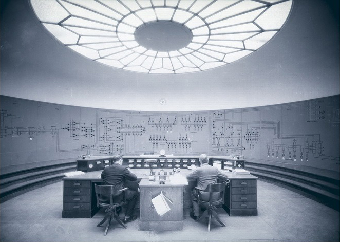 Kontrollrom for samkjøringen av kraftverkene på Østlandet i 1934.